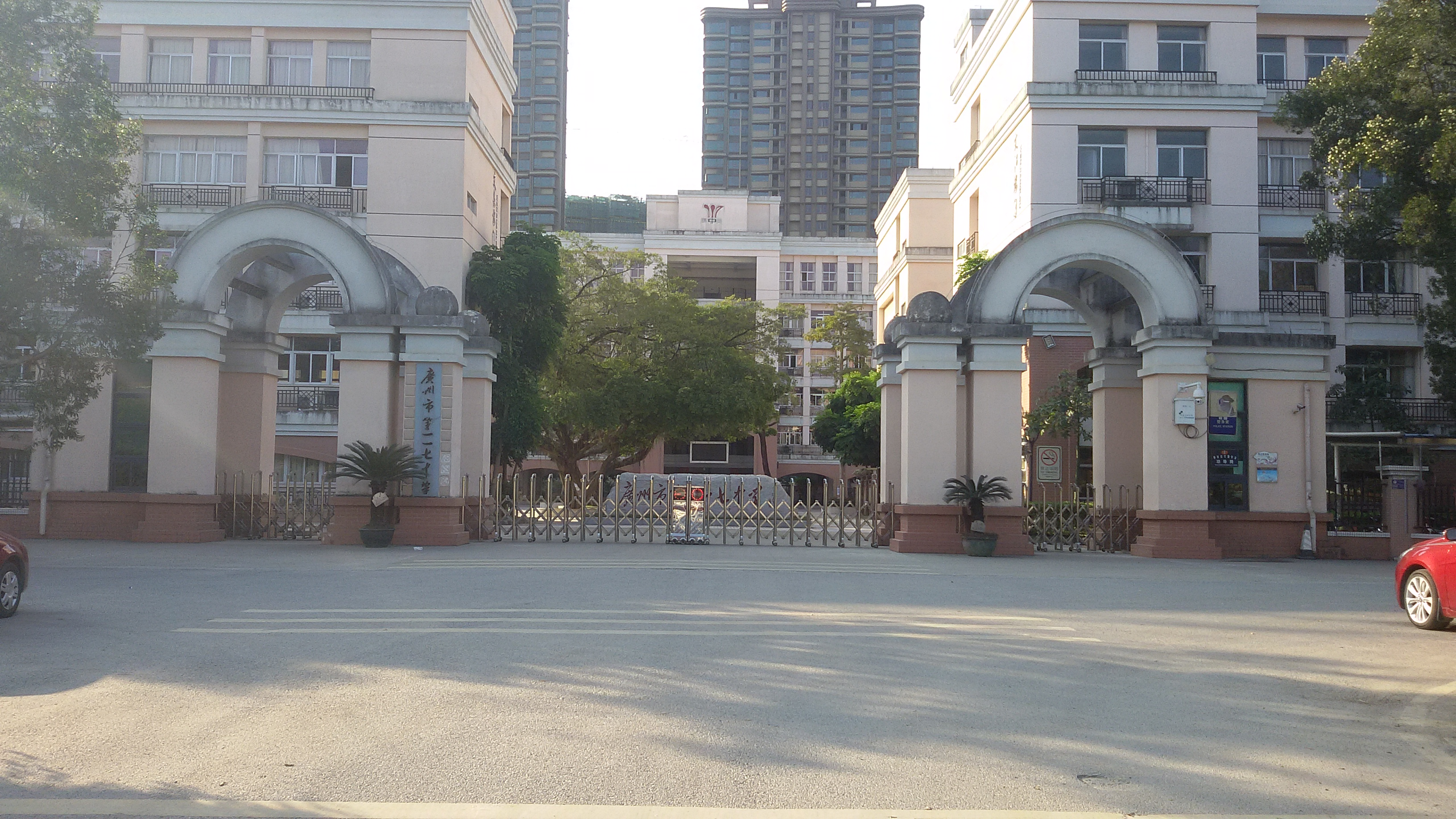 粵語: 廣州市第117中學嘅正門